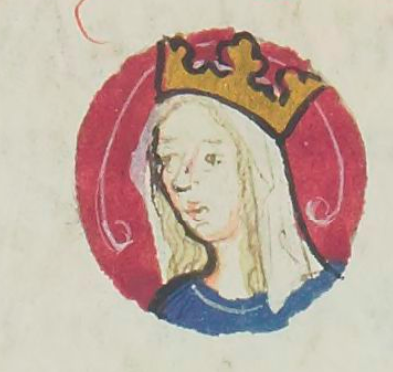 Marguerite of Provence in miniature